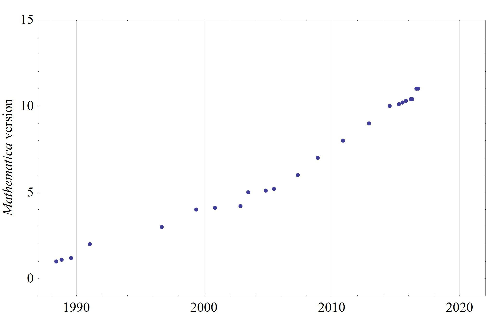 Updated 2016/01/04